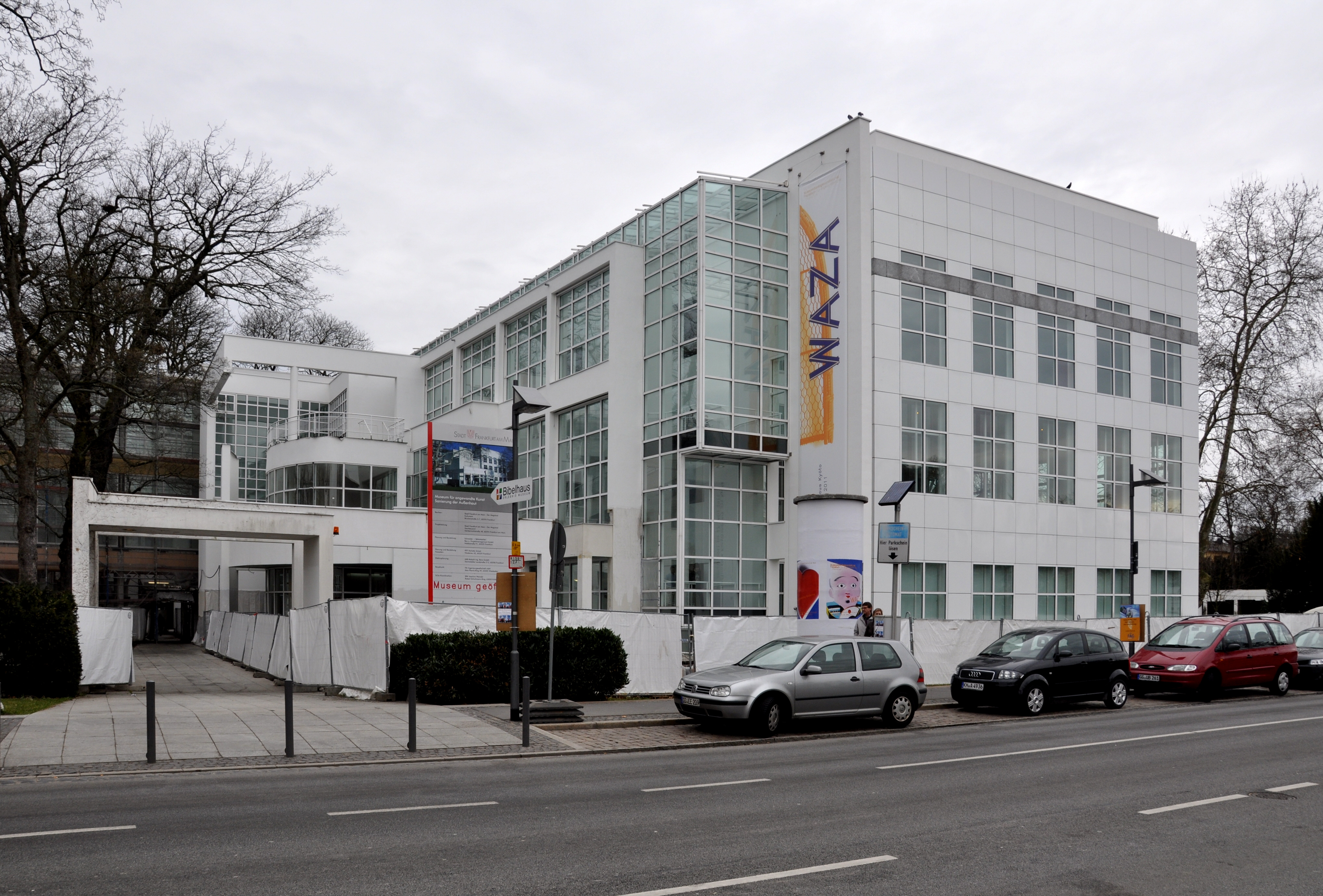 Frankfurt, Museum für Angewandte Kunst Frankfurt (während der Renovierung, 2011)